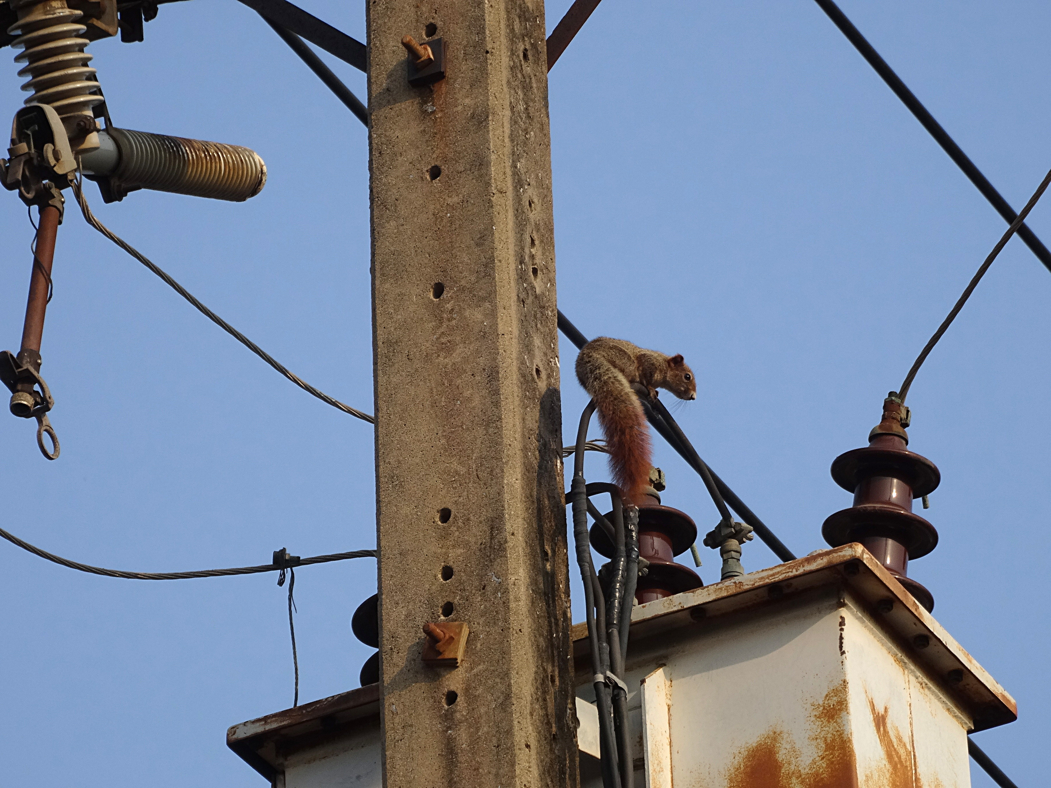 Finlayson-Hörnchen in Ayutthaya